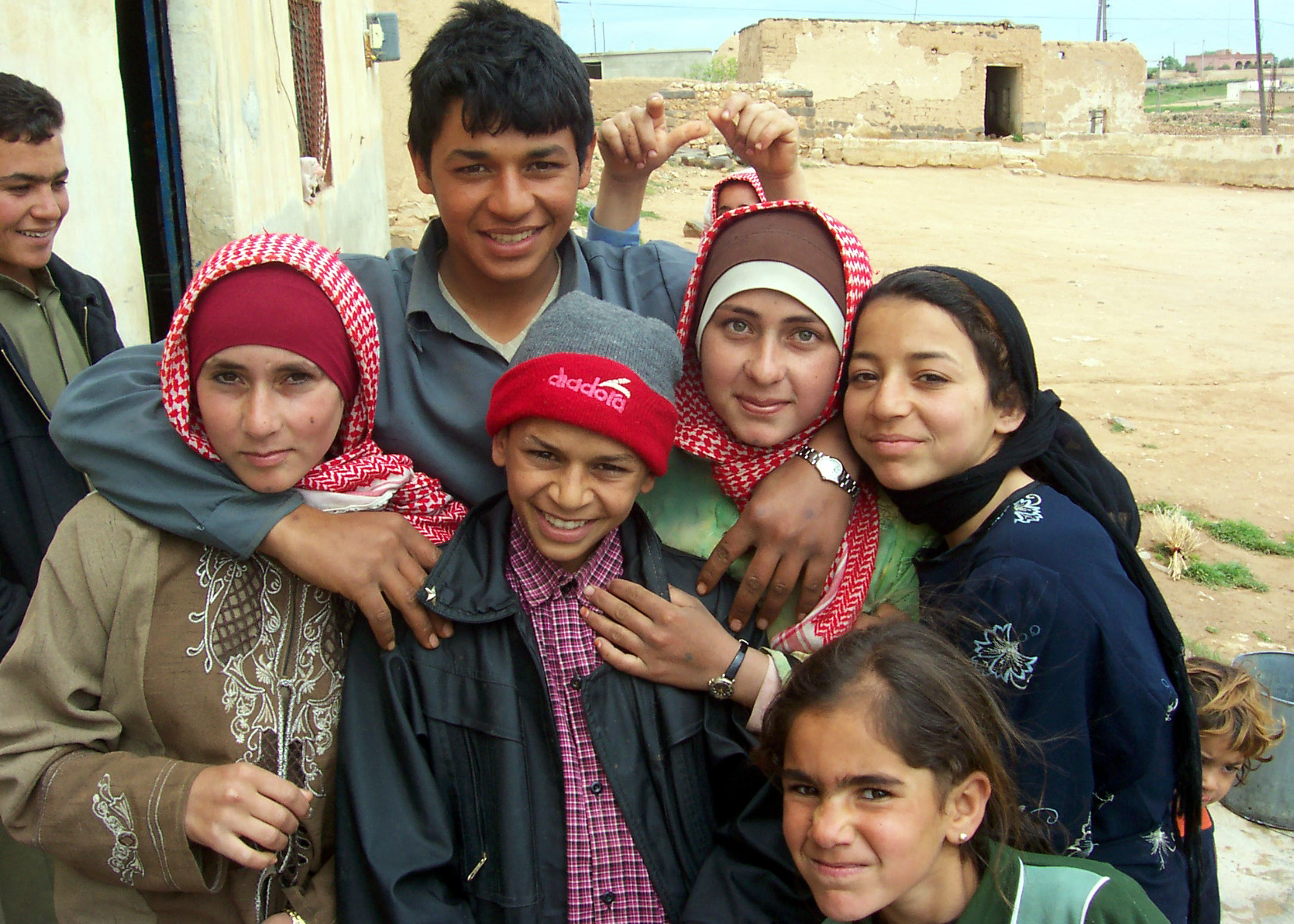 Bedu children, Aleppo, Syria